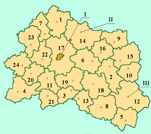 Orel Oblast map by Al Silonov Карта районов Орловской области